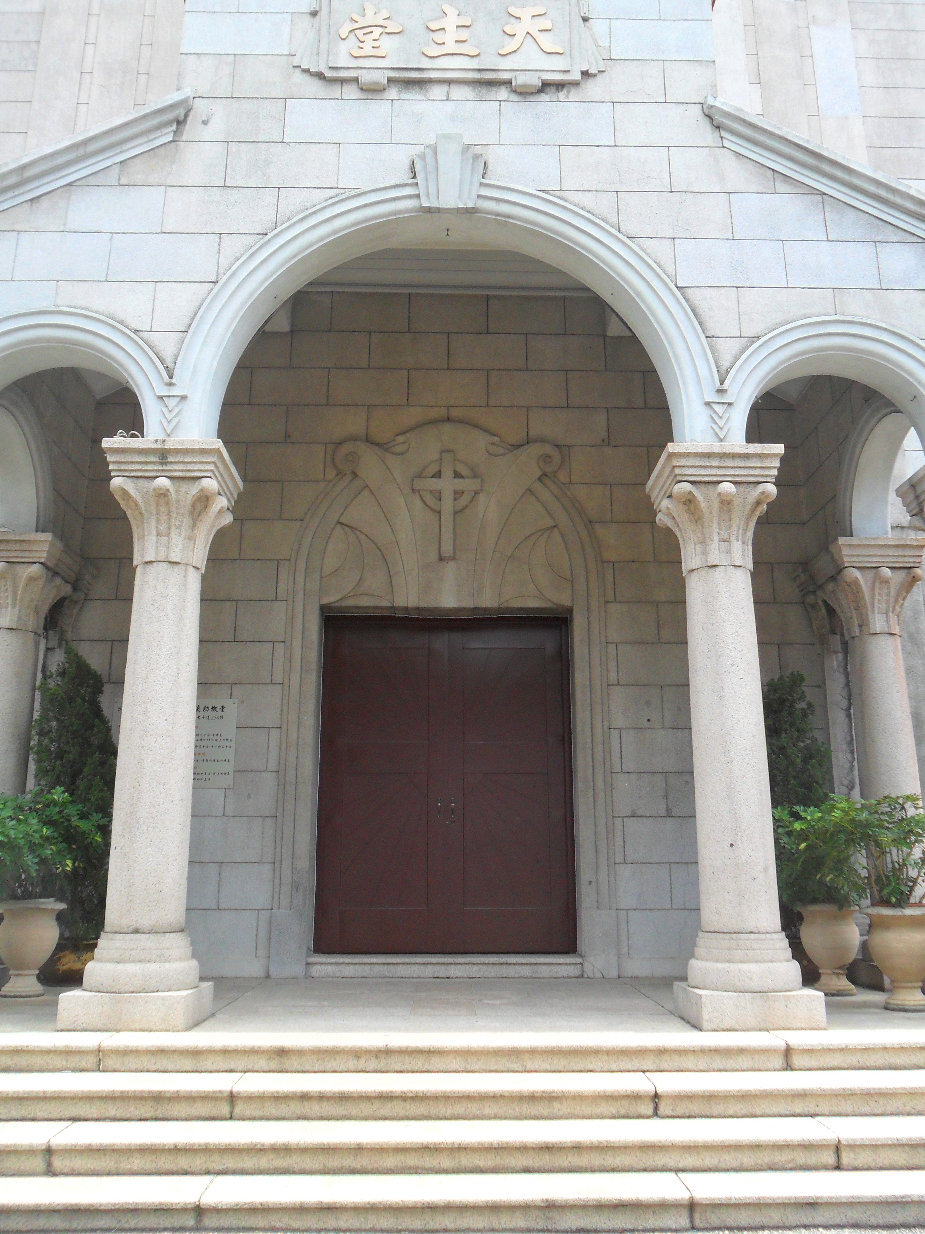 中文（香港）: 聖德肋撒堂, 香港, 中國